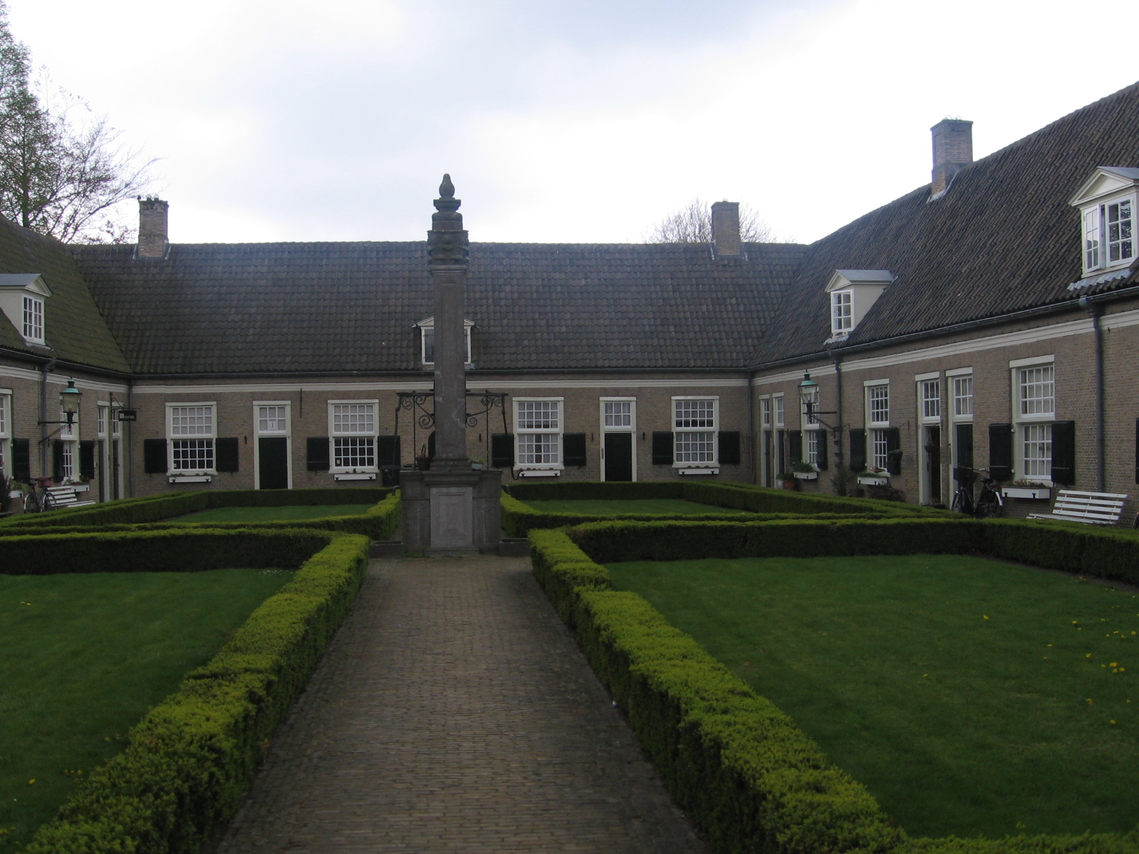 Zicht op een deel van het Sint Paulushofje in Etten-Leur